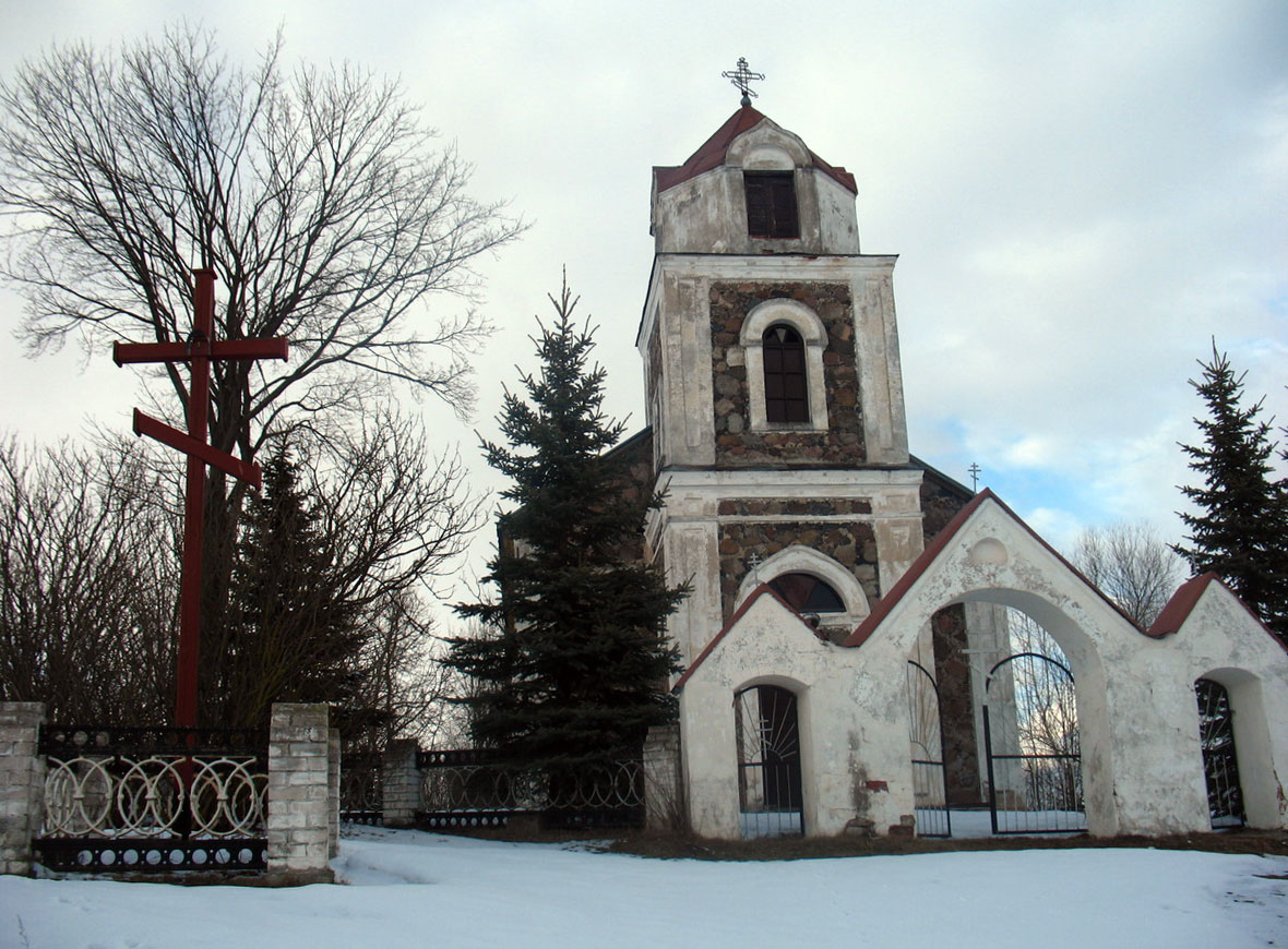 Беларуская (тарашкевіца): Груздава